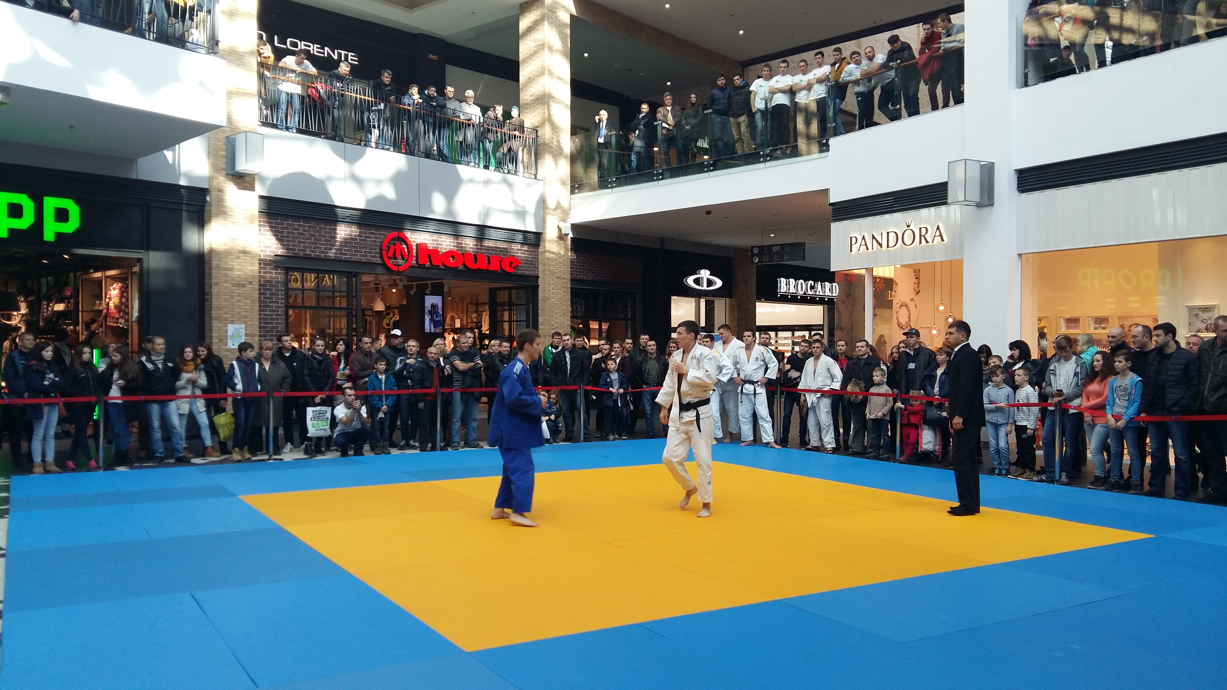 Місто Львів, 2016 рік